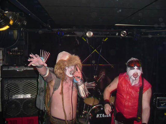 Bild på sportlovs sista spelning i Göteborg 2004